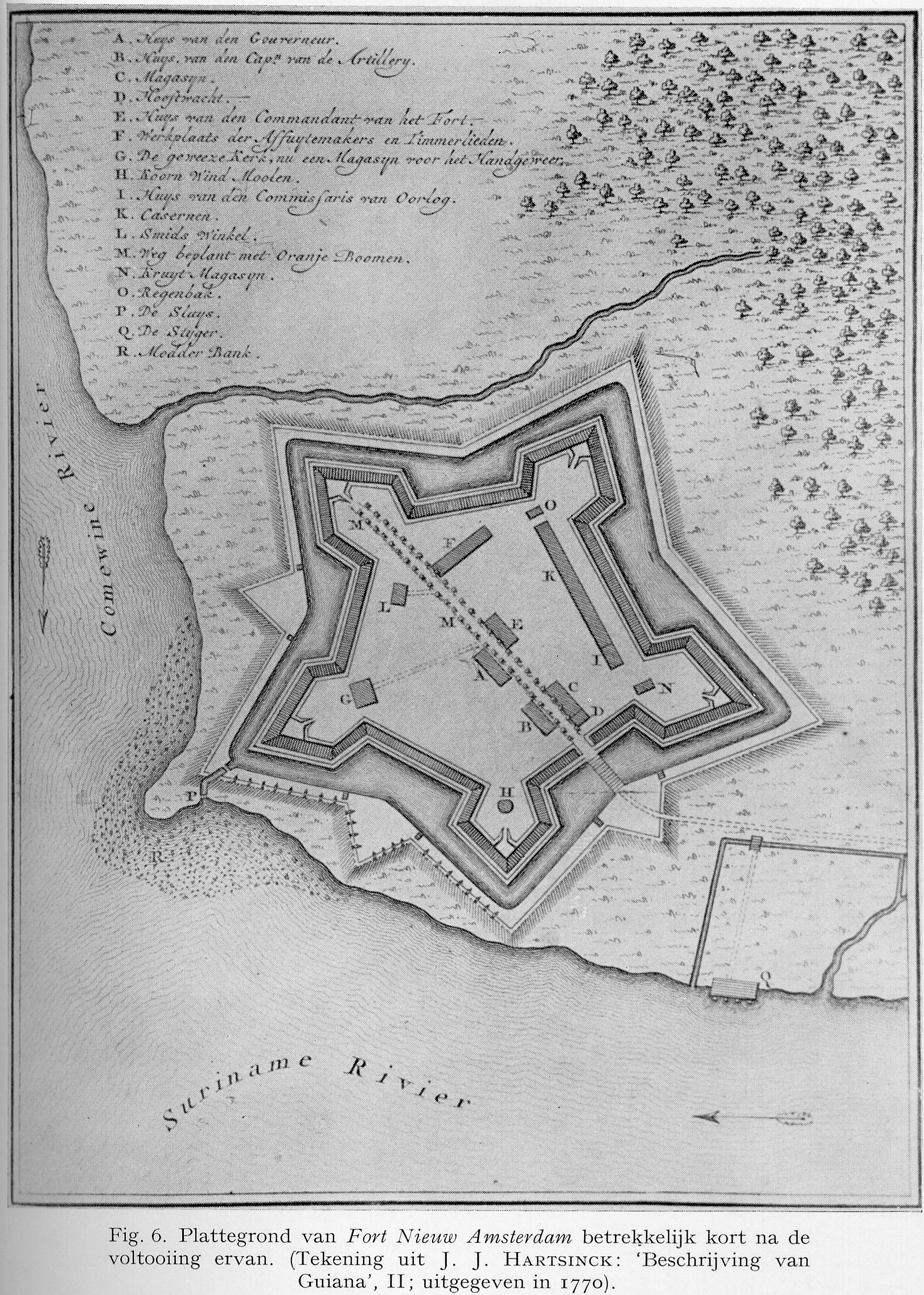 Das Fort Nieuw-Amsterdam in Suriname gezeichnet kurz nach der Fertigstellung 1747. Eigener scan.